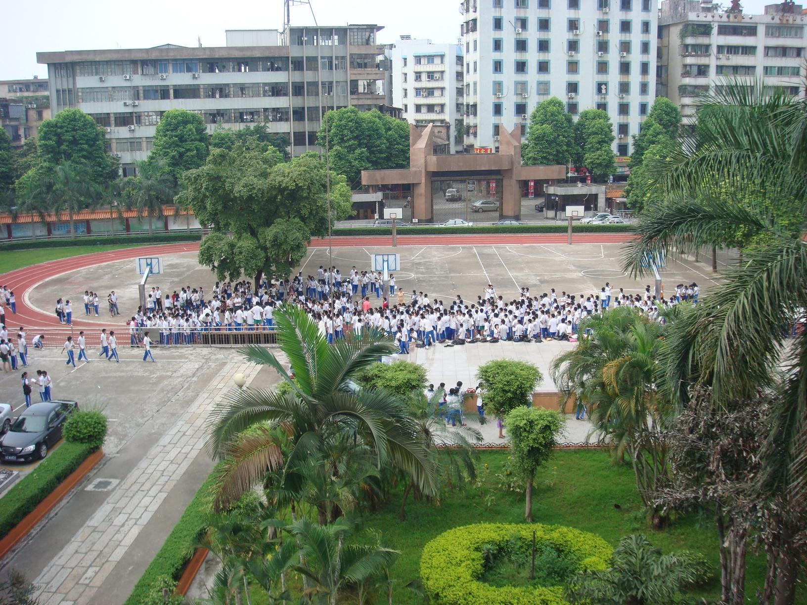 旧校操场